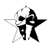 شعار إلترا انفيرنو